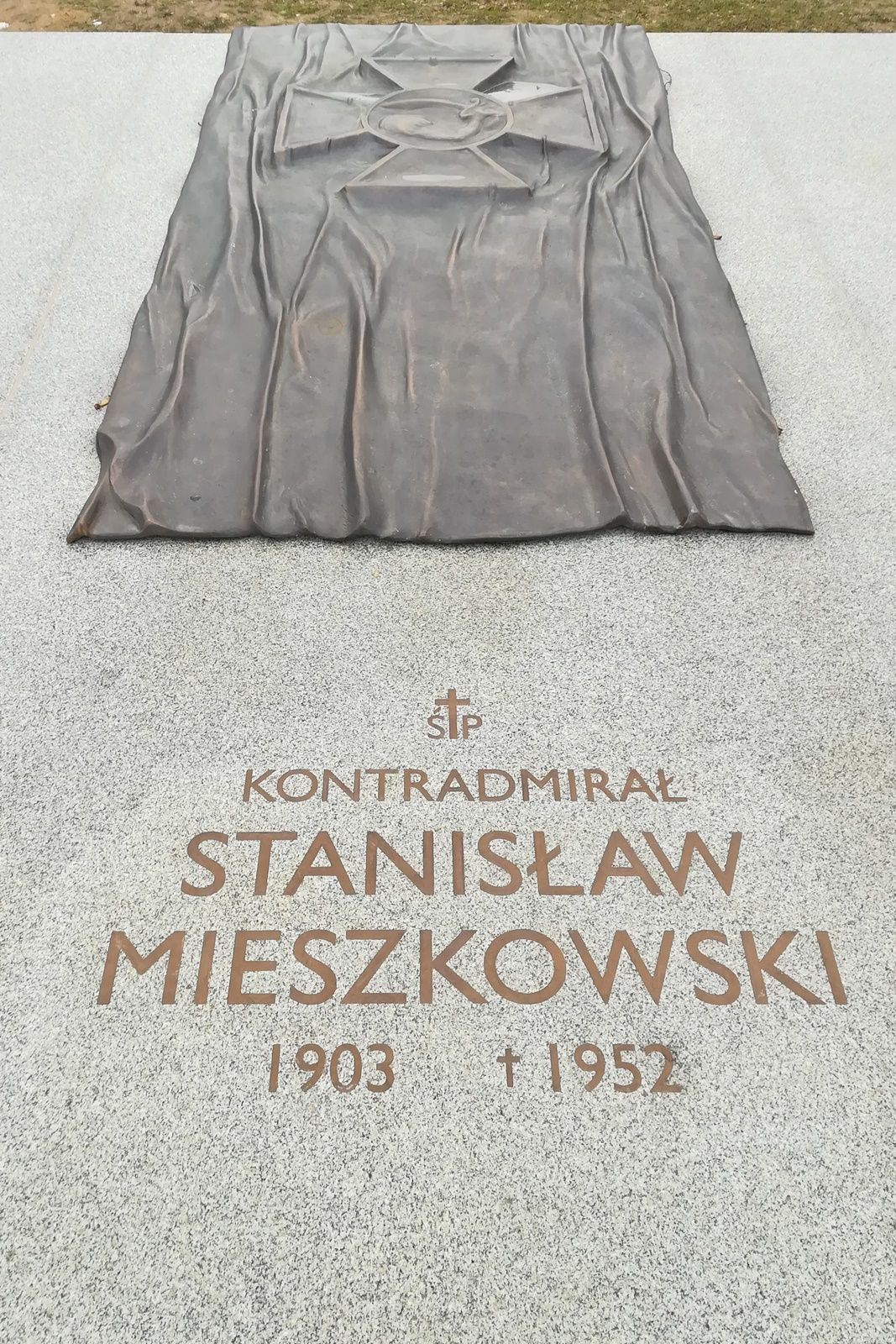 Cmentarz Marynarki Wojennej_Kwatera Pamięci_Kontradmirał_Mieszkowski_1